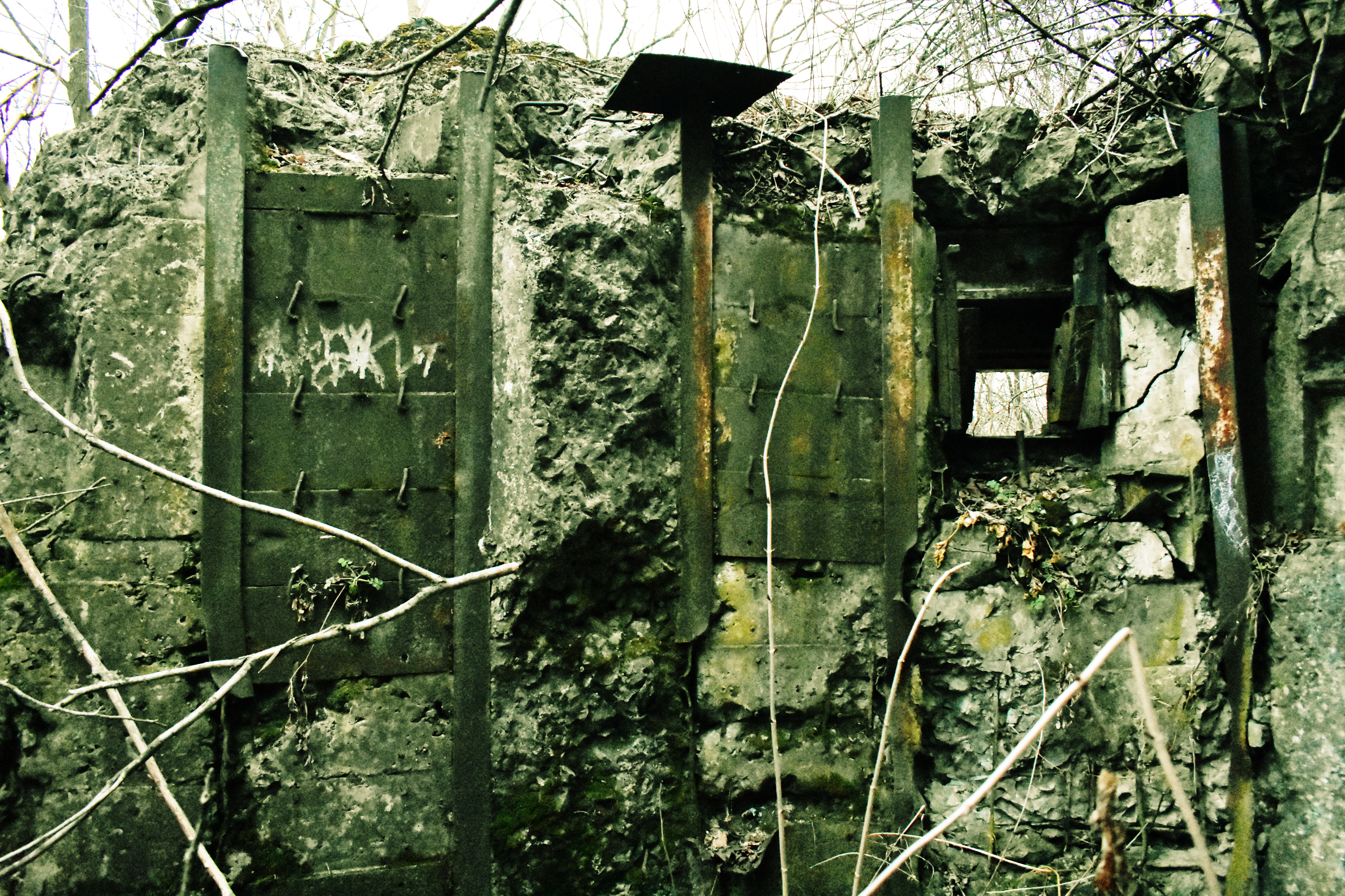 ДОТ 112 Лінія Сталіна, околиці м. Могилів-Подільський Вінницька область